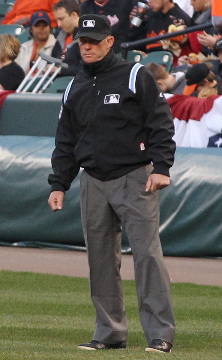 Jim Wolf